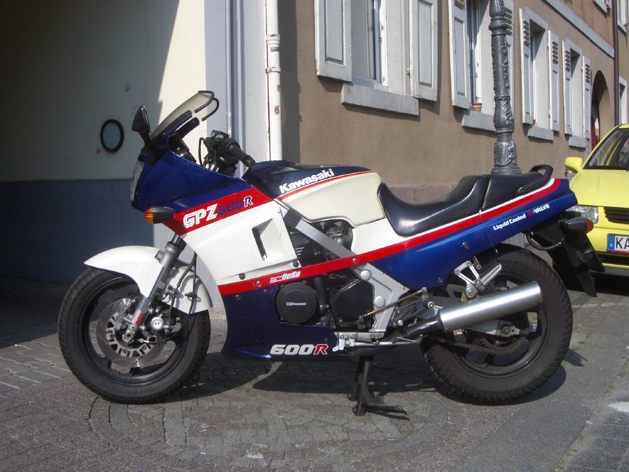 Mein erstes schnelles Motorrad. Vmax 214 km/h. Verkauft 2006 wegen MV Agusta F4 und kleiner technischer Mängel.